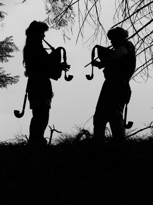 Беларуская (тарашкевіца): DiGrease's Buffoon Theatre - Archaic Folklore Show - "Шальмоўскі Тэатр ДыГрыза" - Архаічны Фальклор: Пікнік-фотасэт, арганізаваны "Шальмоўскім Тэатрам" і музыкам Алесем Чумаковым (Беларусь).